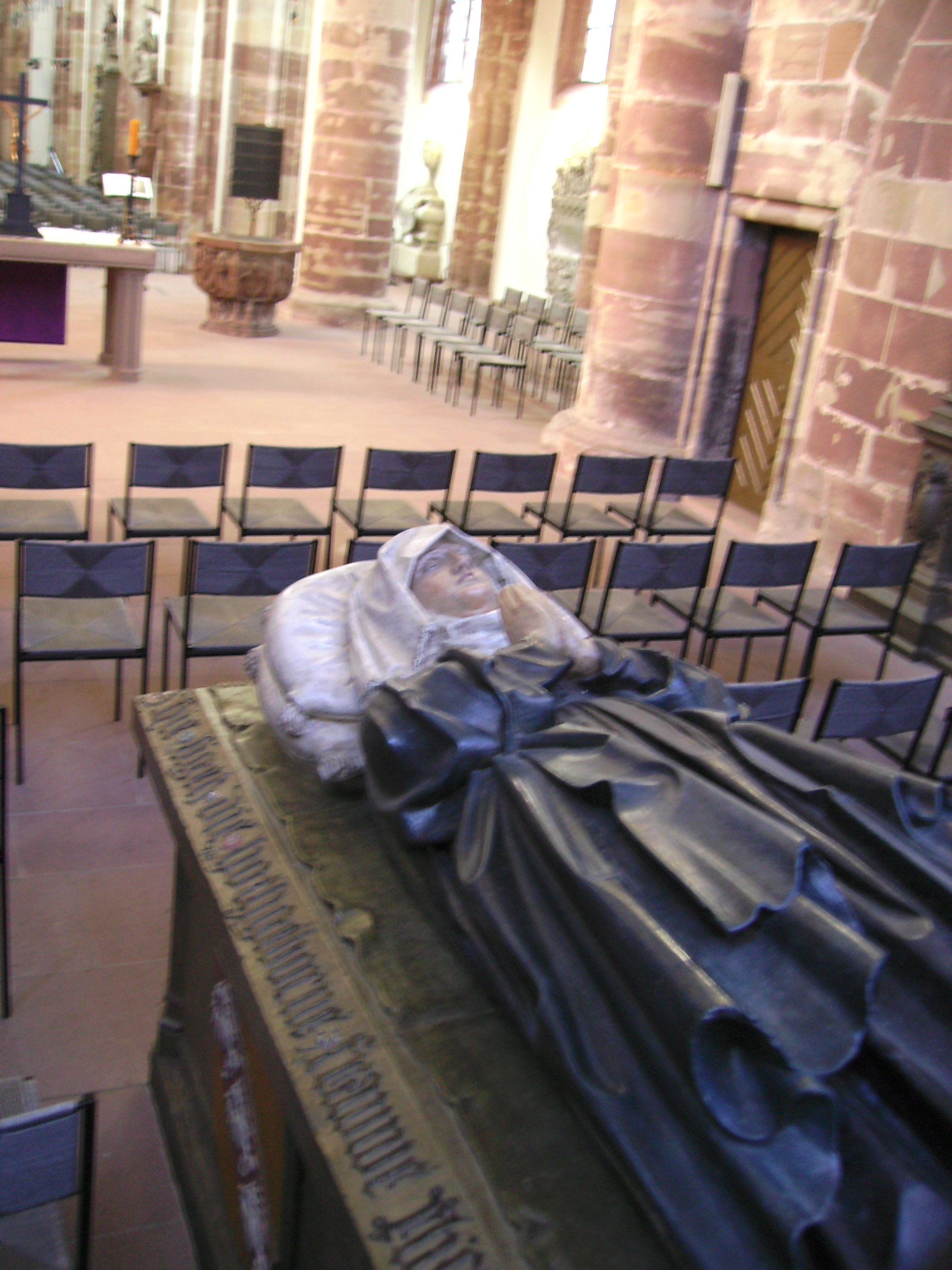 Elisabeth: Thumba in Stiftskirche St. Arnual